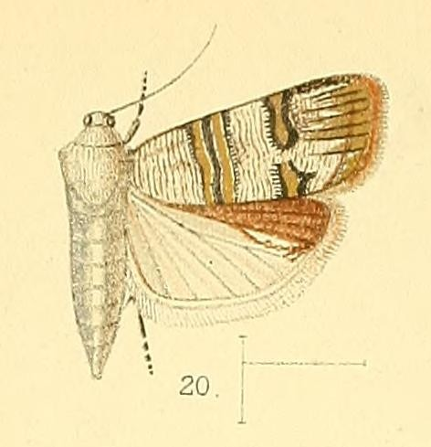 Nigilgia albitogata